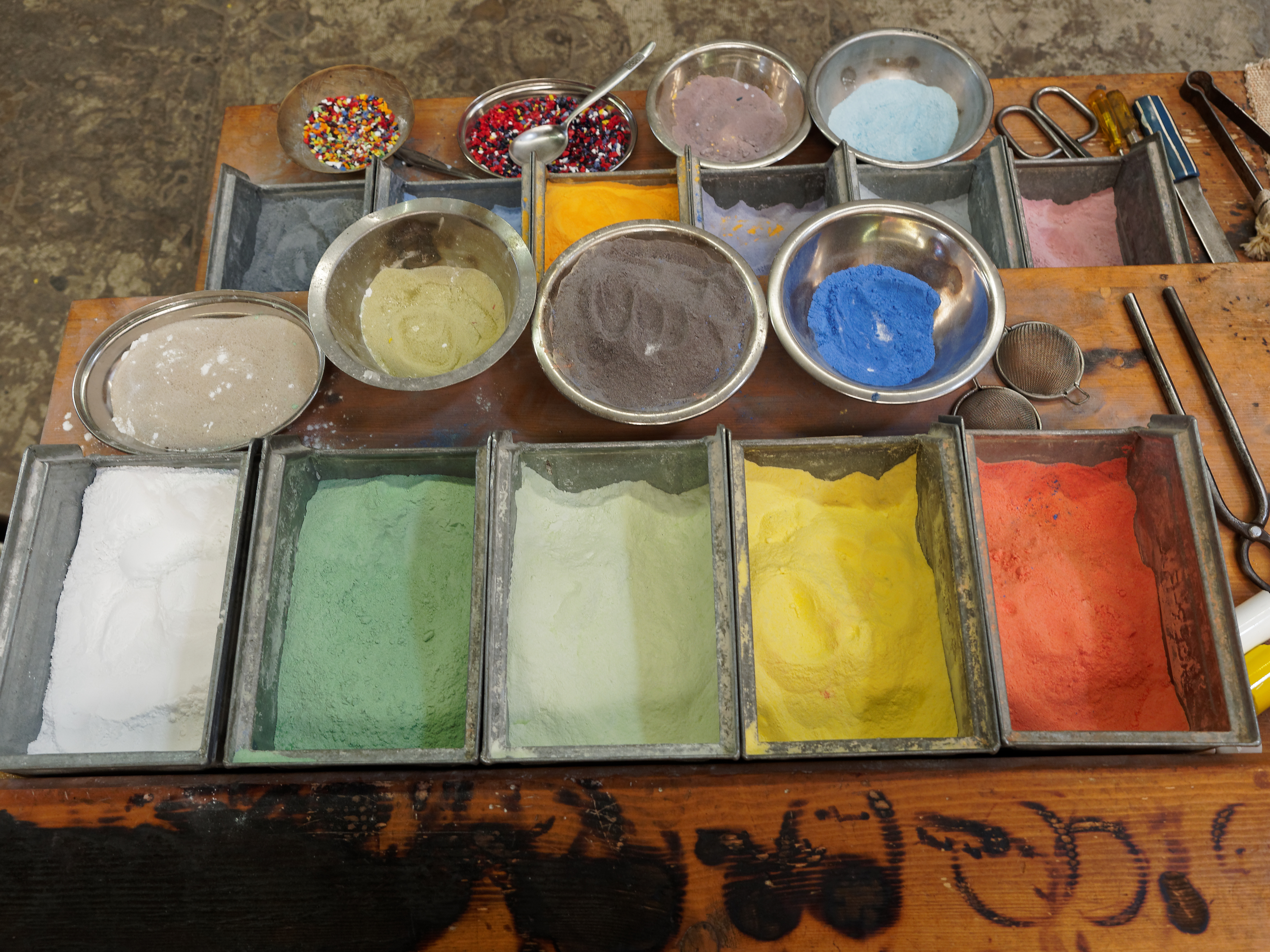 Verschiedenfarbiges Glasmehl zum Einfärben des Kristallglases in der Glasmanufaktur in Willingen, Hessen. Foto anlässlich des Wikipedia Sauerland-Stammtisches in Willingen